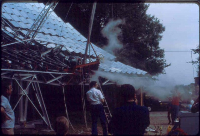 Jean-Luc PERRIER avec un jet de vapeur produit par son concentrateur solaire, pendant les portes ouvertes de son installation, le 27/09/1980